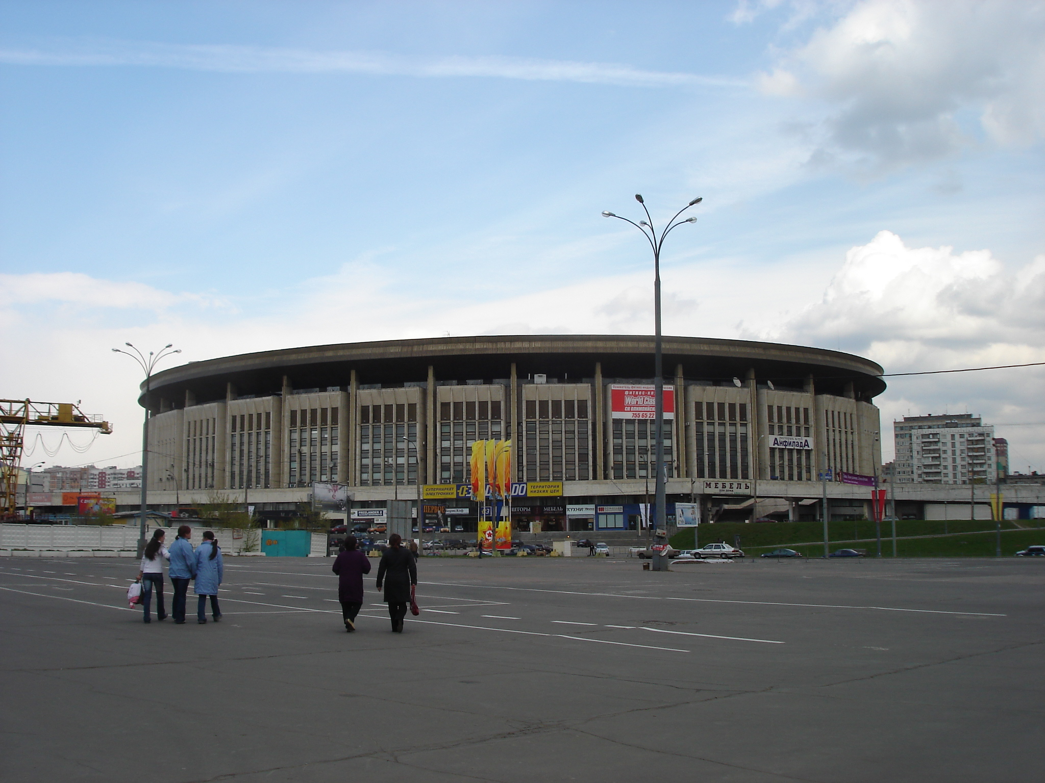 С/к Олимпийский